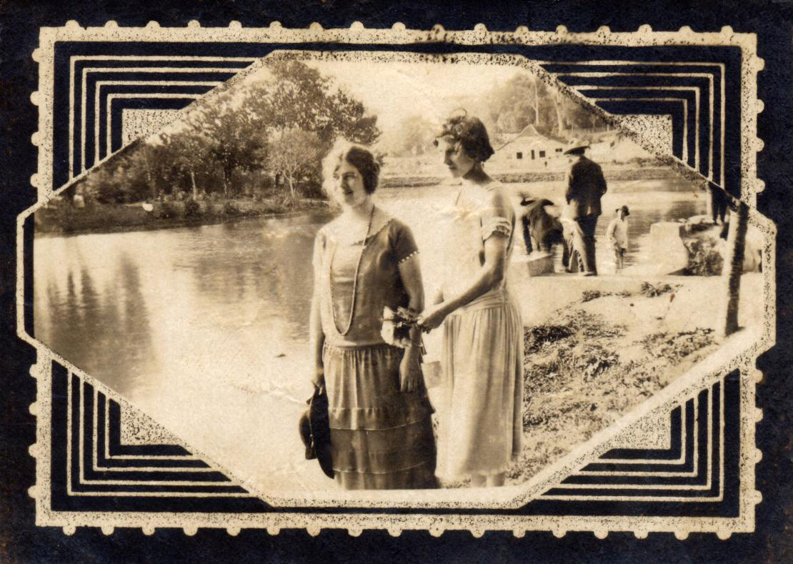 Elisabeth Rieke e Conceição no Passeio Público de Curitiba, em 1923.